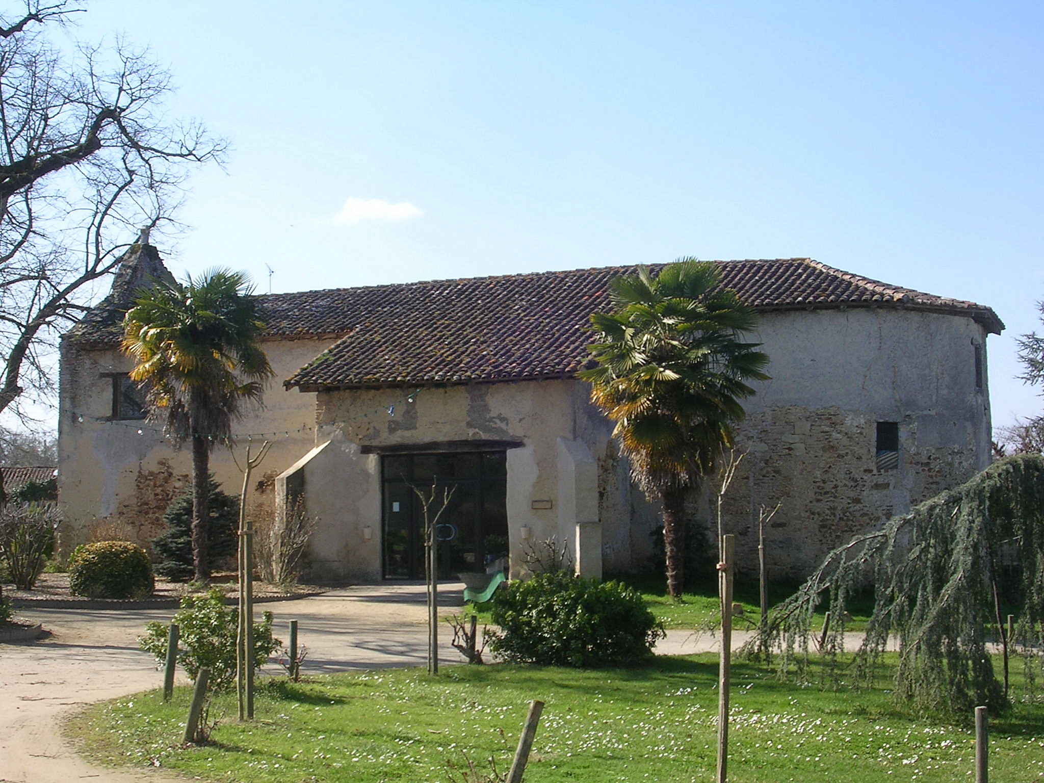 Ancienne église Saint-Blaise à Hontanx, dans le département français des Landes